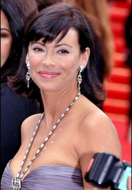 Mathilda May au festival de Cannes